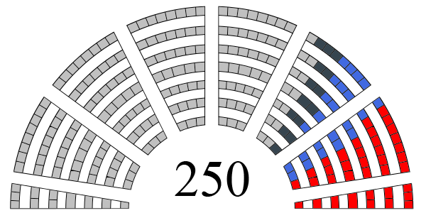 Parlamentarni izbori 2000 - raspodela mandata